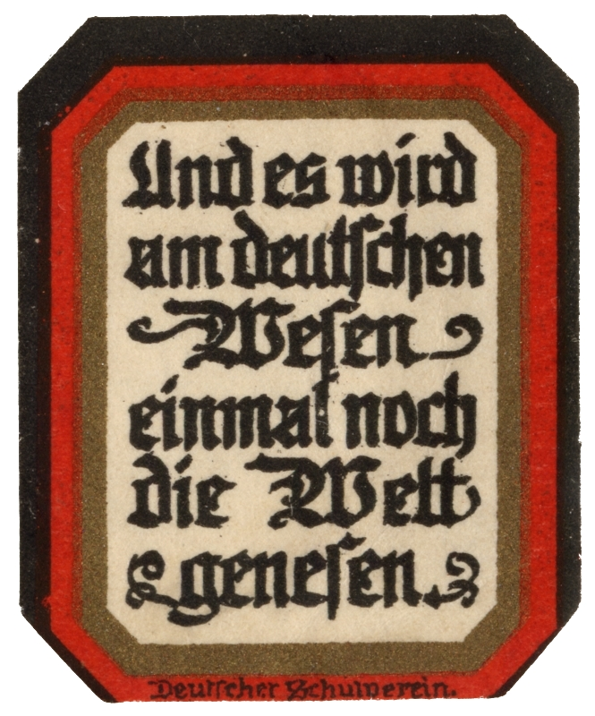 Propagandaverschlussmarke des Deutschen Schulvereins aus der Zeit des Ersten Weltkriegs. Propagandaspruch: „Und es wird am deutschen Wesen einmal noch die Welt genesen.“